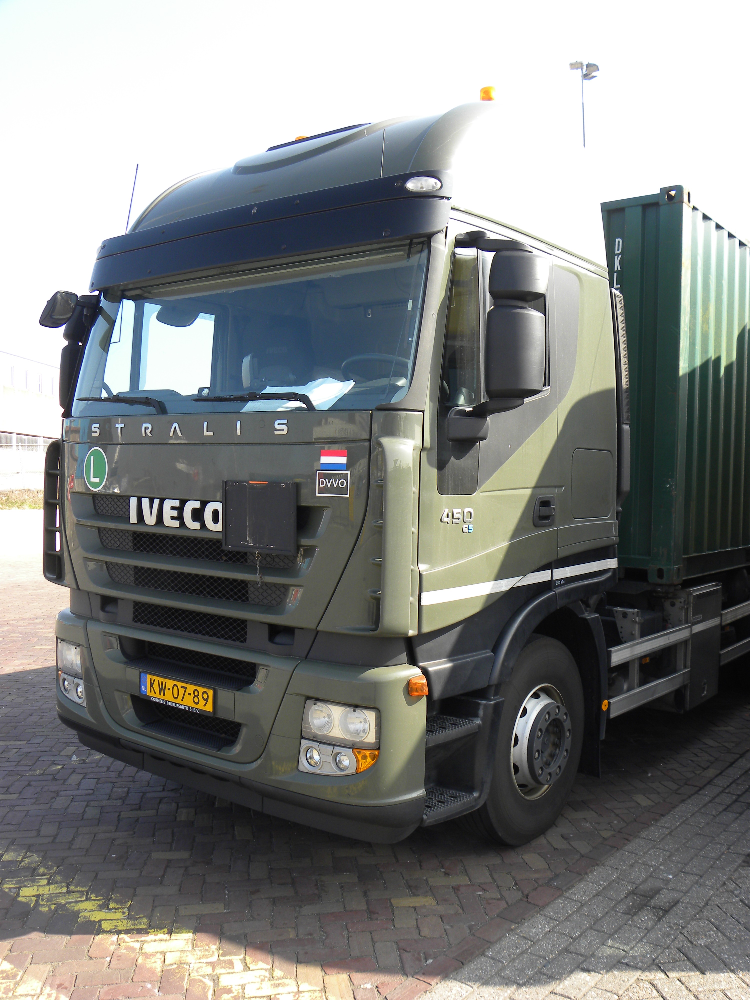 Iveco Stralis 450 E5 DVVO Defensie Verkeers- en Vervoersorganisatie